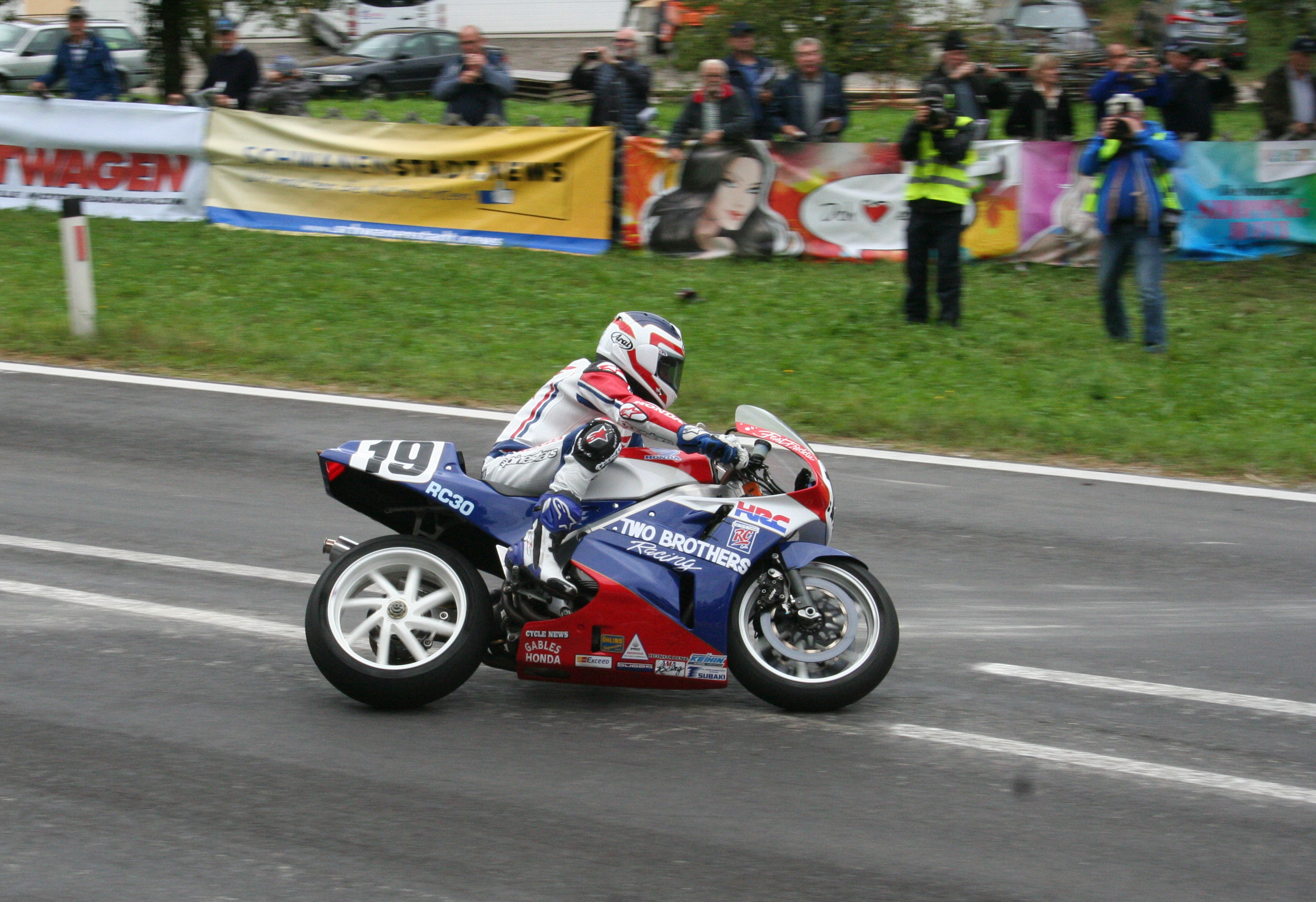 Freddie Spencer, auf einer Honda AMA-RC30, Baujahr 1990 (748 ccm, 135 PS), beim Oldtimer Grand Prix in Schwanenstadt, Oberösterreich, am 18. September 2016